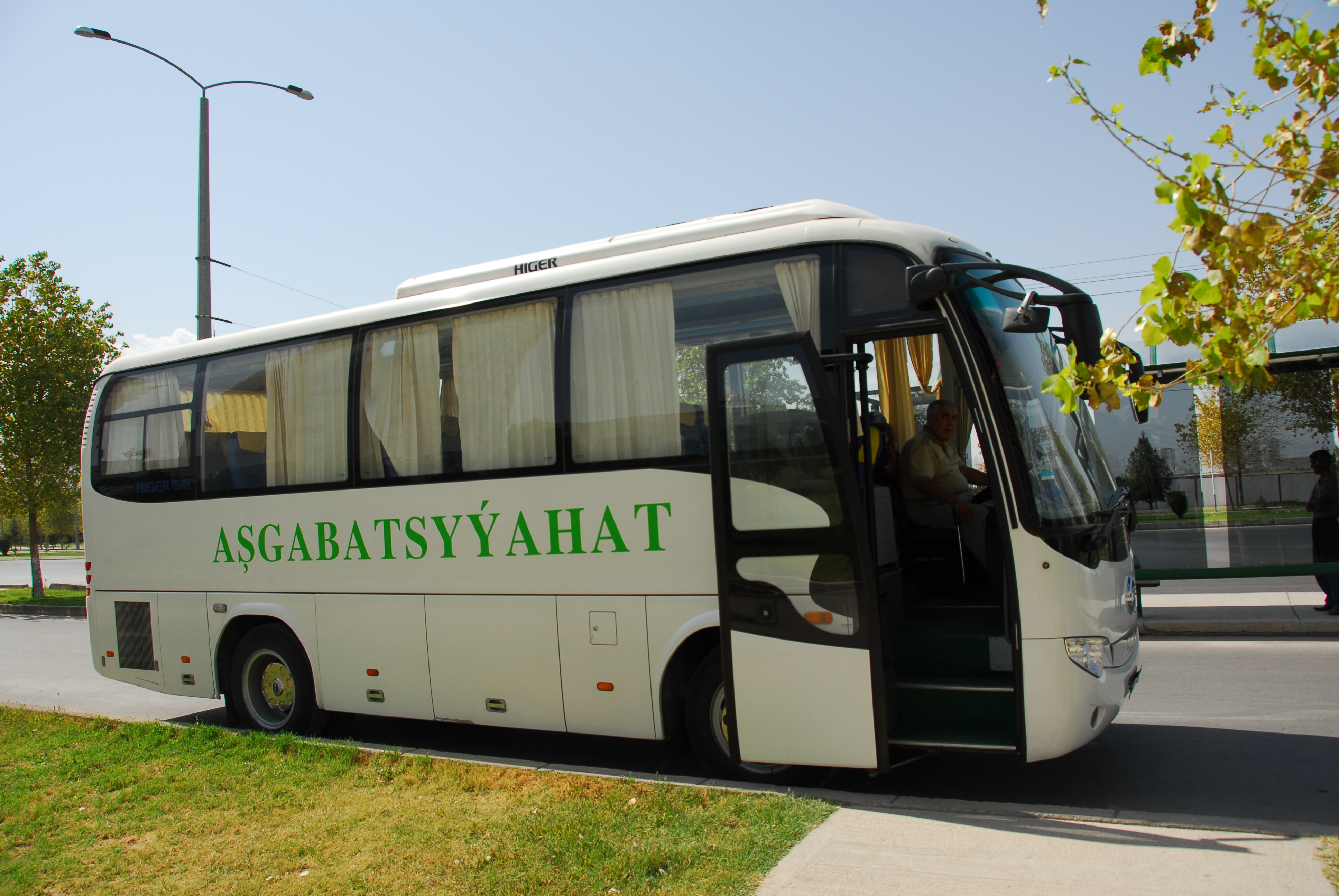 stans08-024